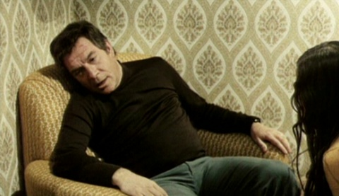 Képkocka az „Olcsó regény” (Romanzo popolare) című filmből